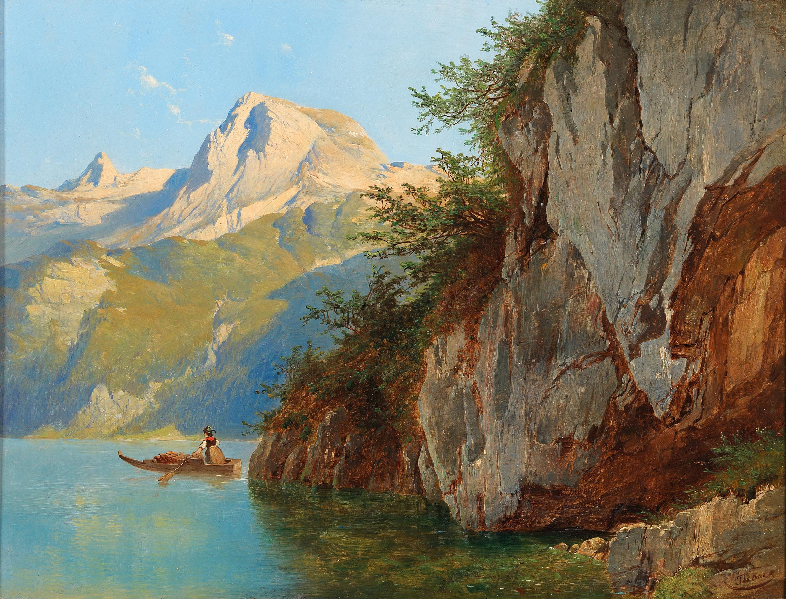 Blick vom “Pfaffengföll” über den Hallstätter See, im Hintergrund der Krippenstein, signiert J. Thoma, Öl auf Holz, 30,5 x 42 cm